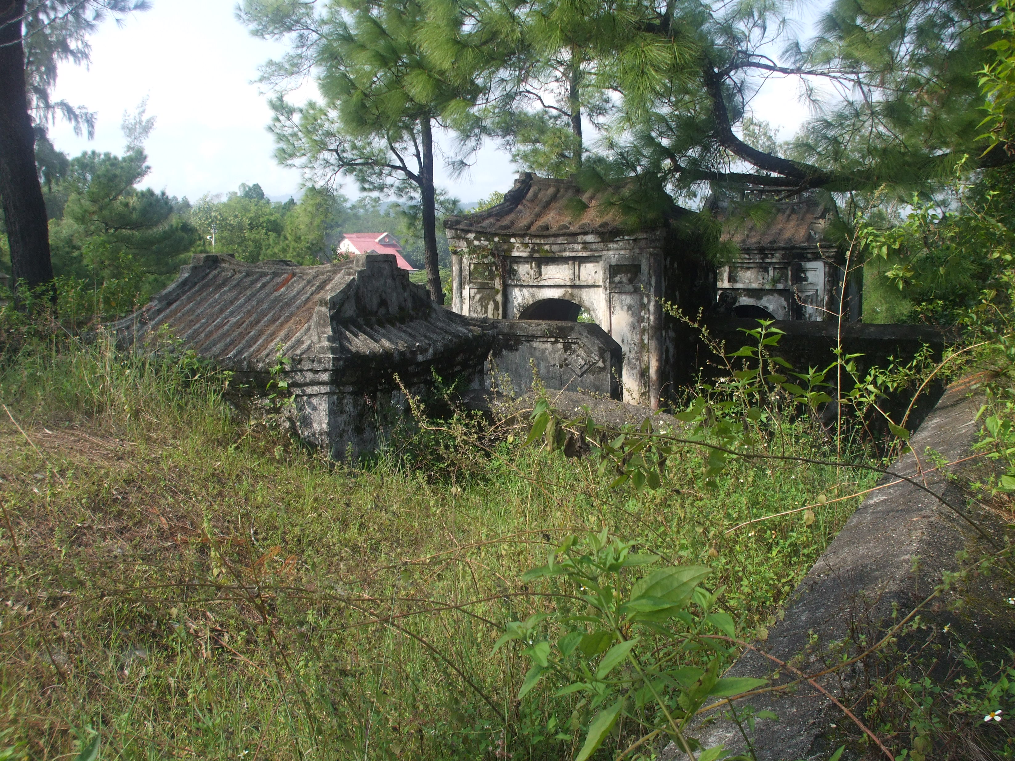 Mộ Tùng Thiện Vương ở gần chùa Từ Hiếu, thành phố Huế, Việt Nam.